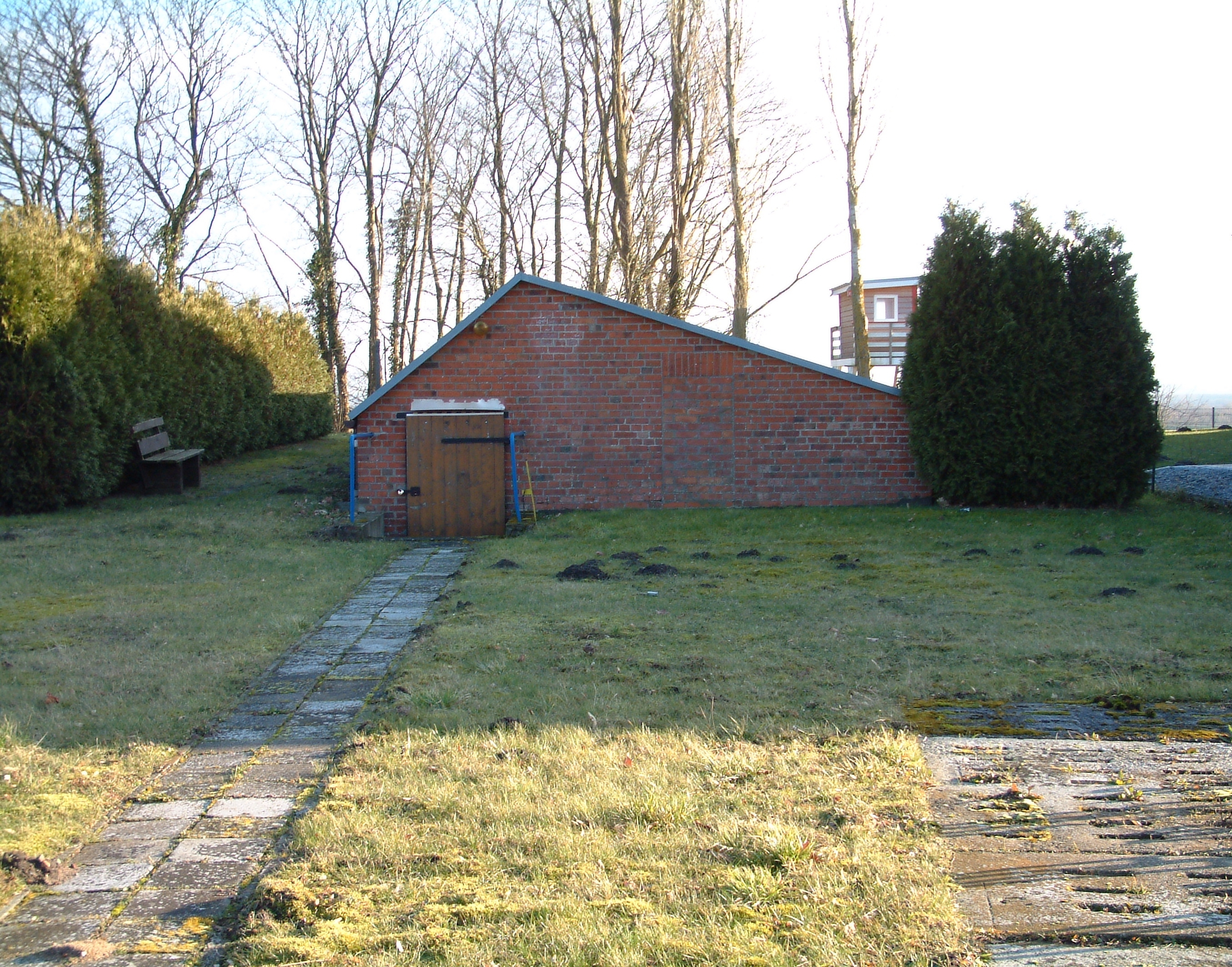 Küchenbaracke KZ Außenstelle Boizenburg